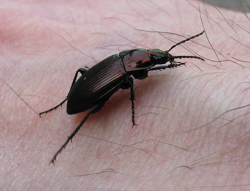 Beschreibung: Laufkäfer / Listkäfer / Poecilus cupreus Fotograf: Darkone, 30. April 2005